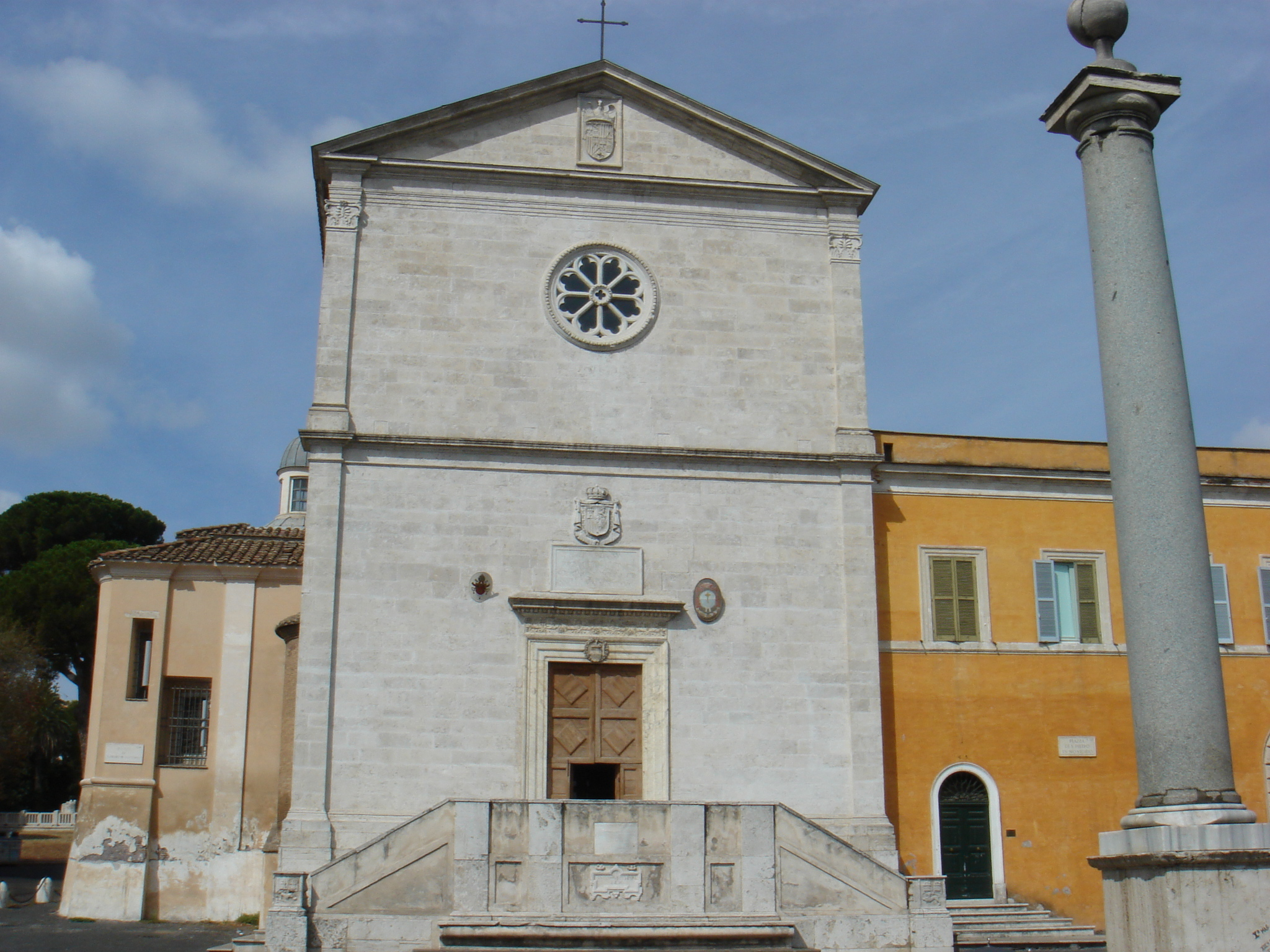 Roma, San Pietro in Montorio al Gianicolo